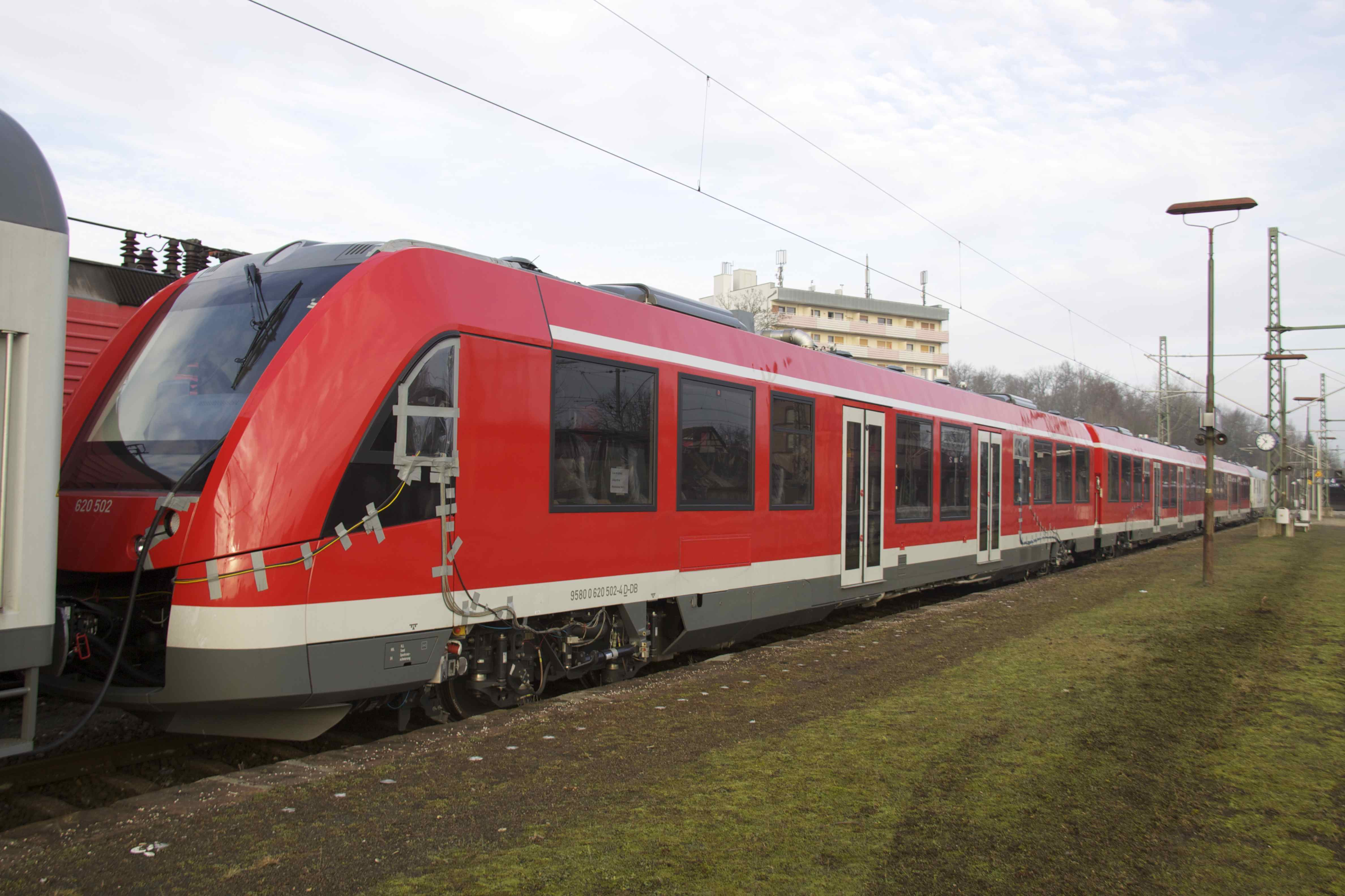 620 502 - LINT 81